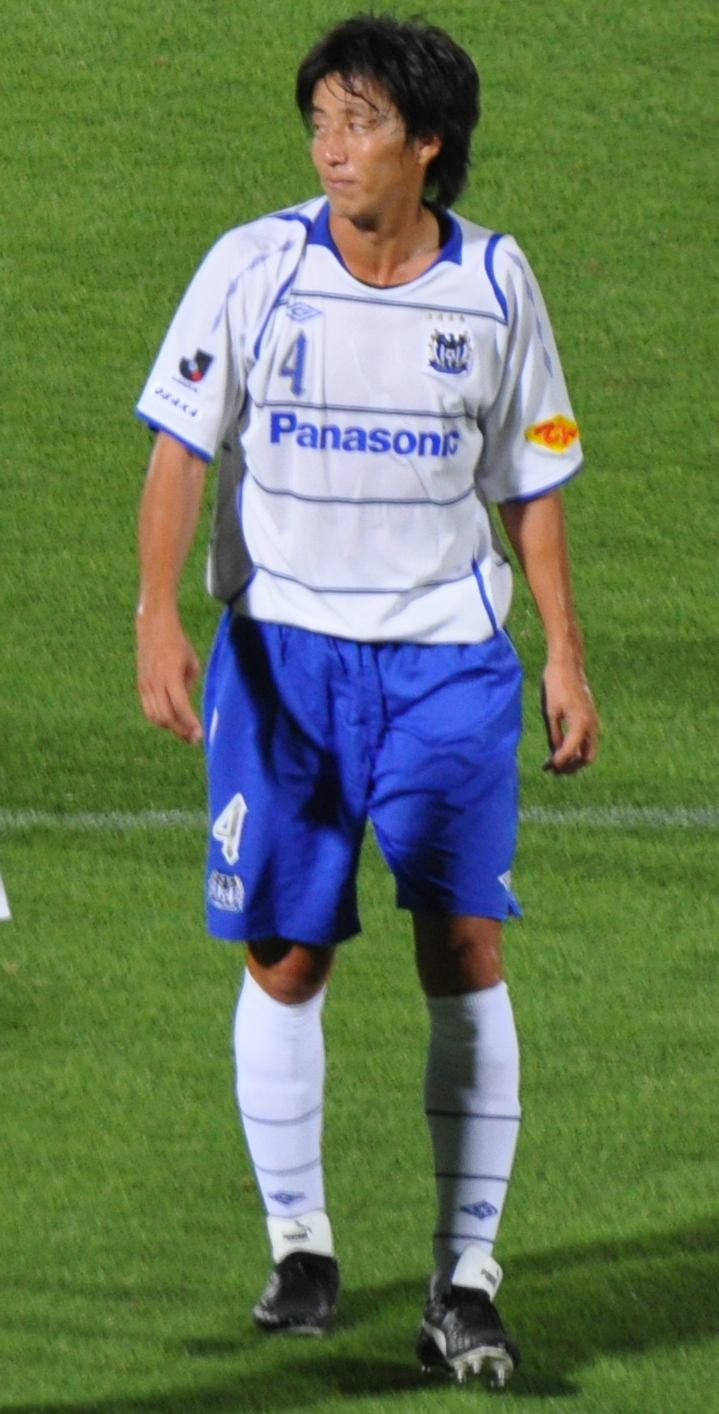 Kawasaki Frontale vs Gamba Osaka_438